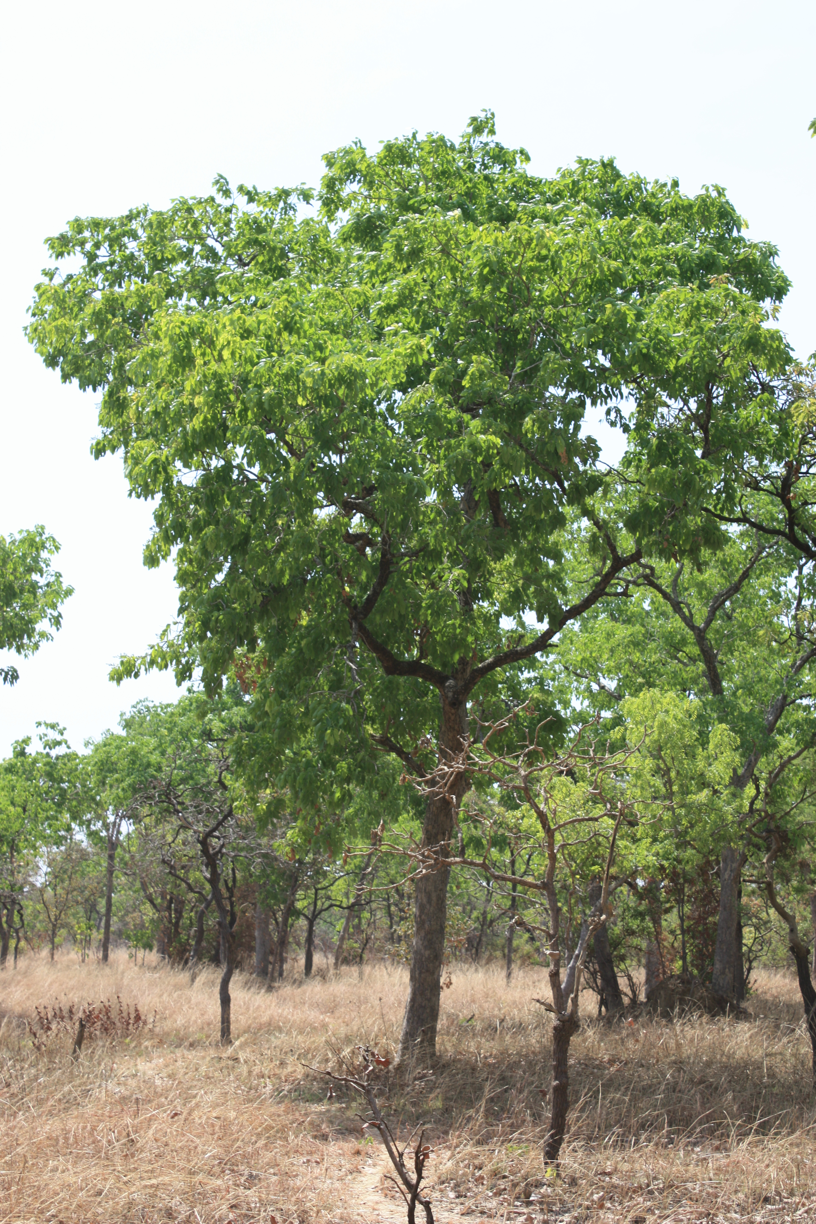 Isoberlinia doka, near Folonzo, SW Burkina Faso